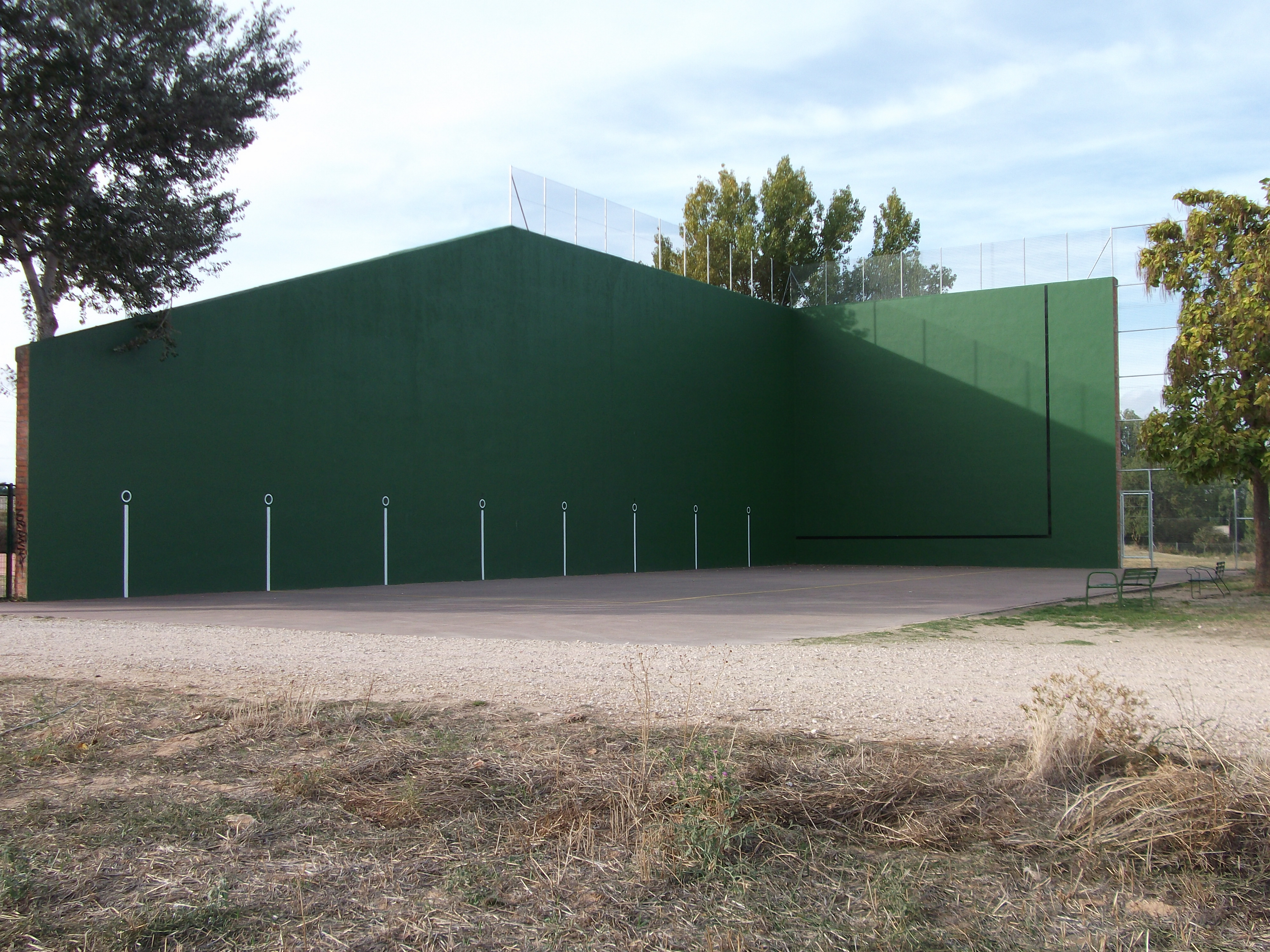 Fotografía del frontón de Sinovas.